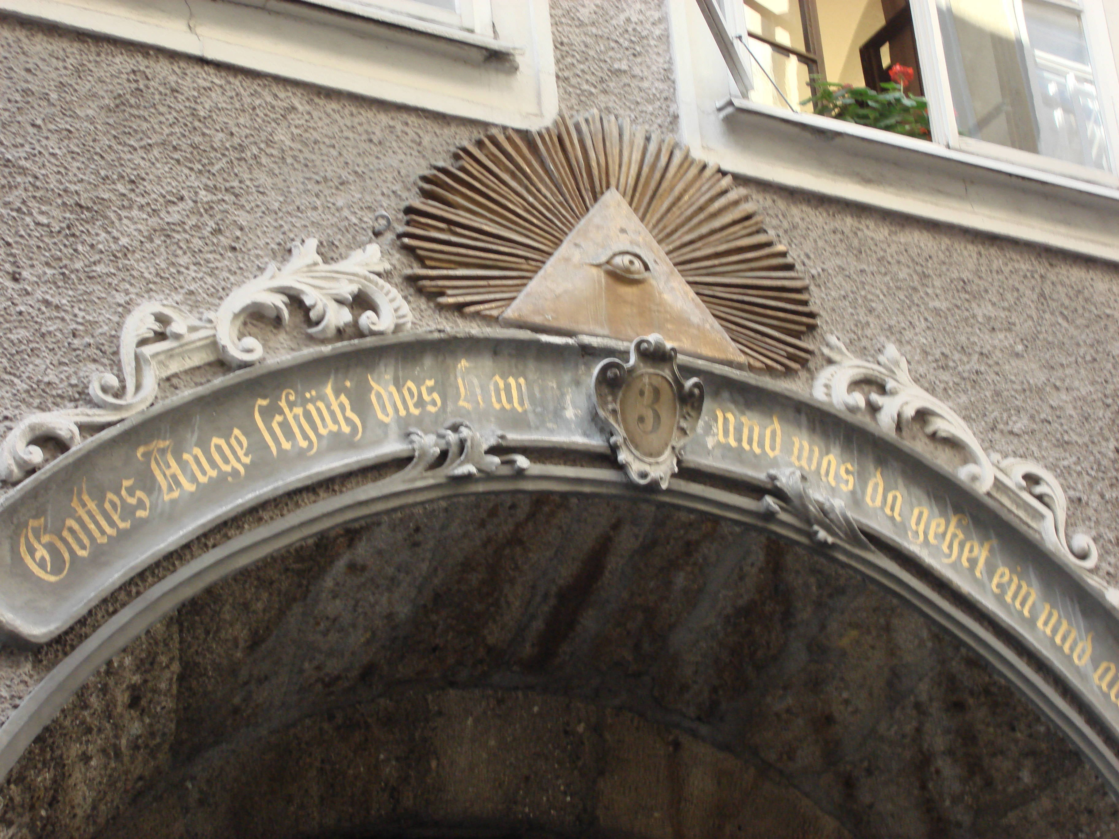 Segmentbogentor Getreidegasse